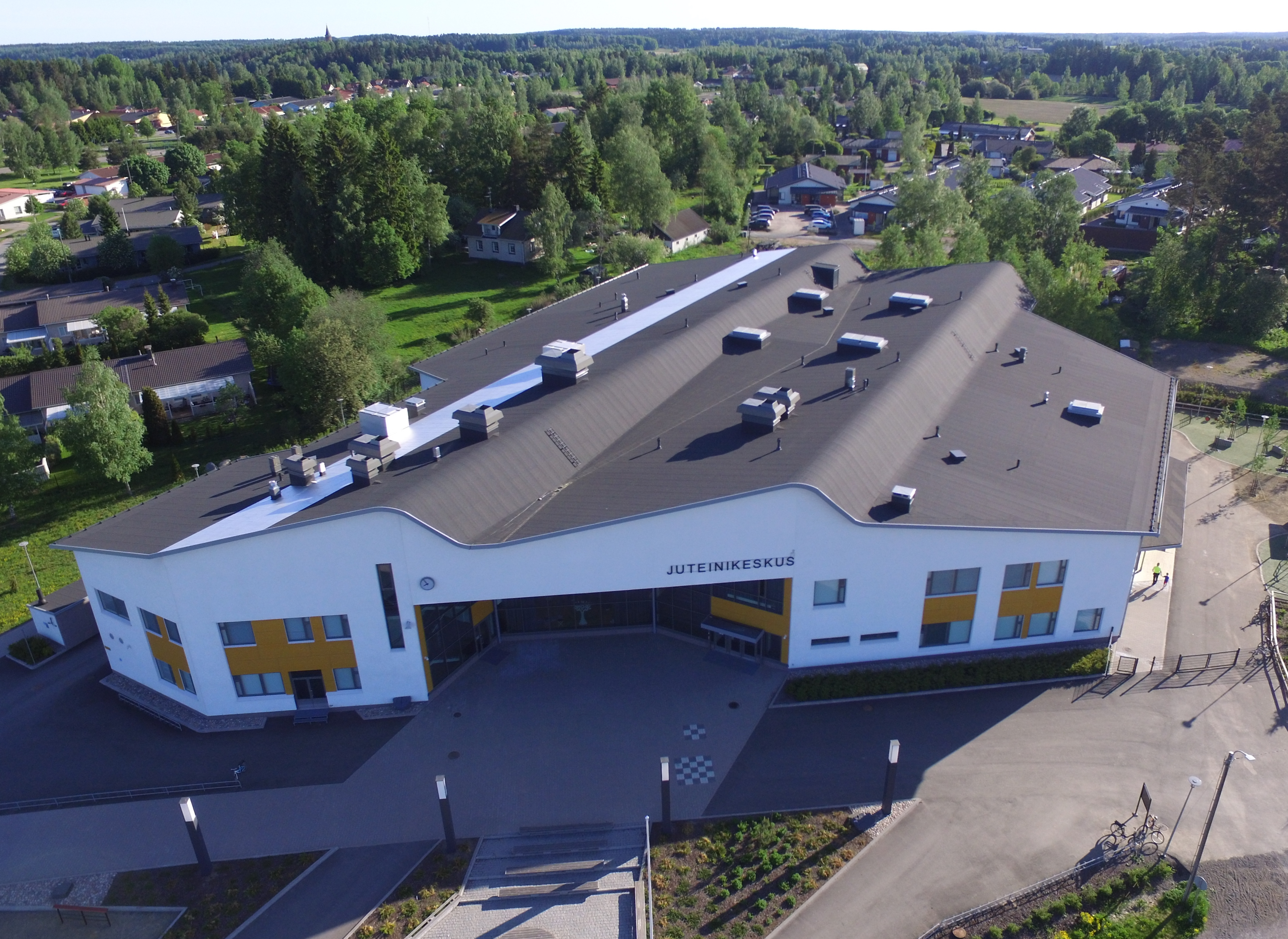 Juteinikeskus Hattulassa on maalämmöllä lämmitettävä monitoimitalo, joka on suunniteltu uudenaikaisia opetusmenetelmiä silmällä pitäen.